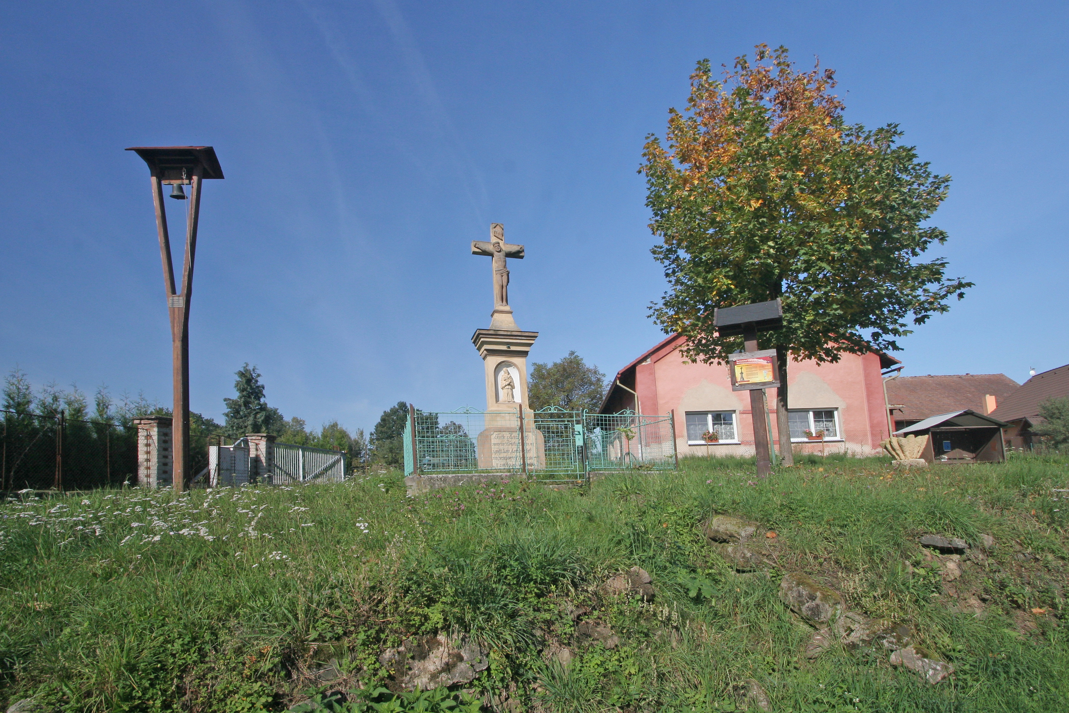 Dolní Raškovice zvonička a křížek